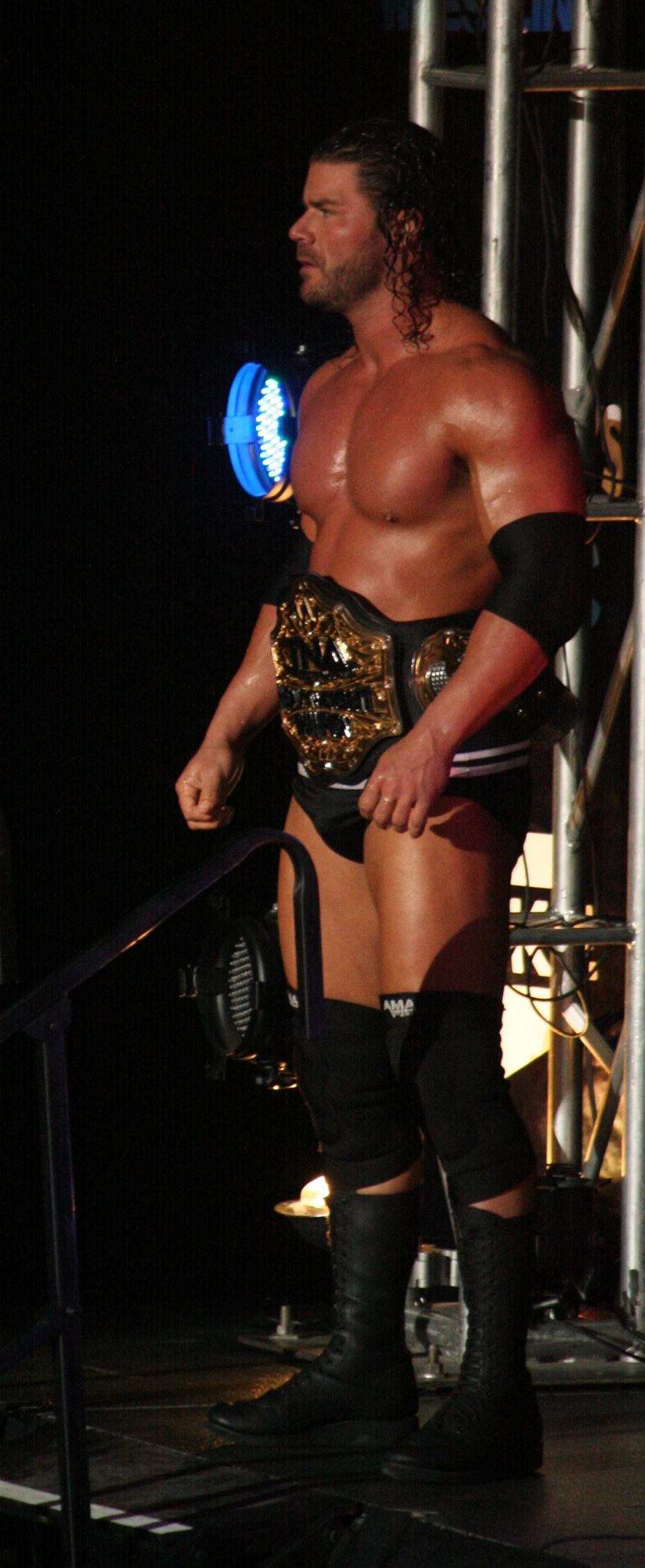 Robert Roode